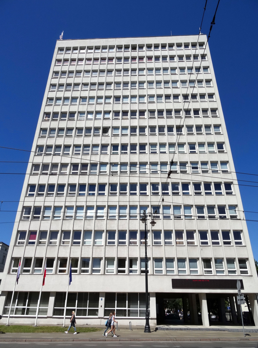 Budynek biurowy, ul. Konarskiego 1 Bydgoszcz, użytkowany m.in. przez Kujawsko-Pomorski Urząd Wojewódzki